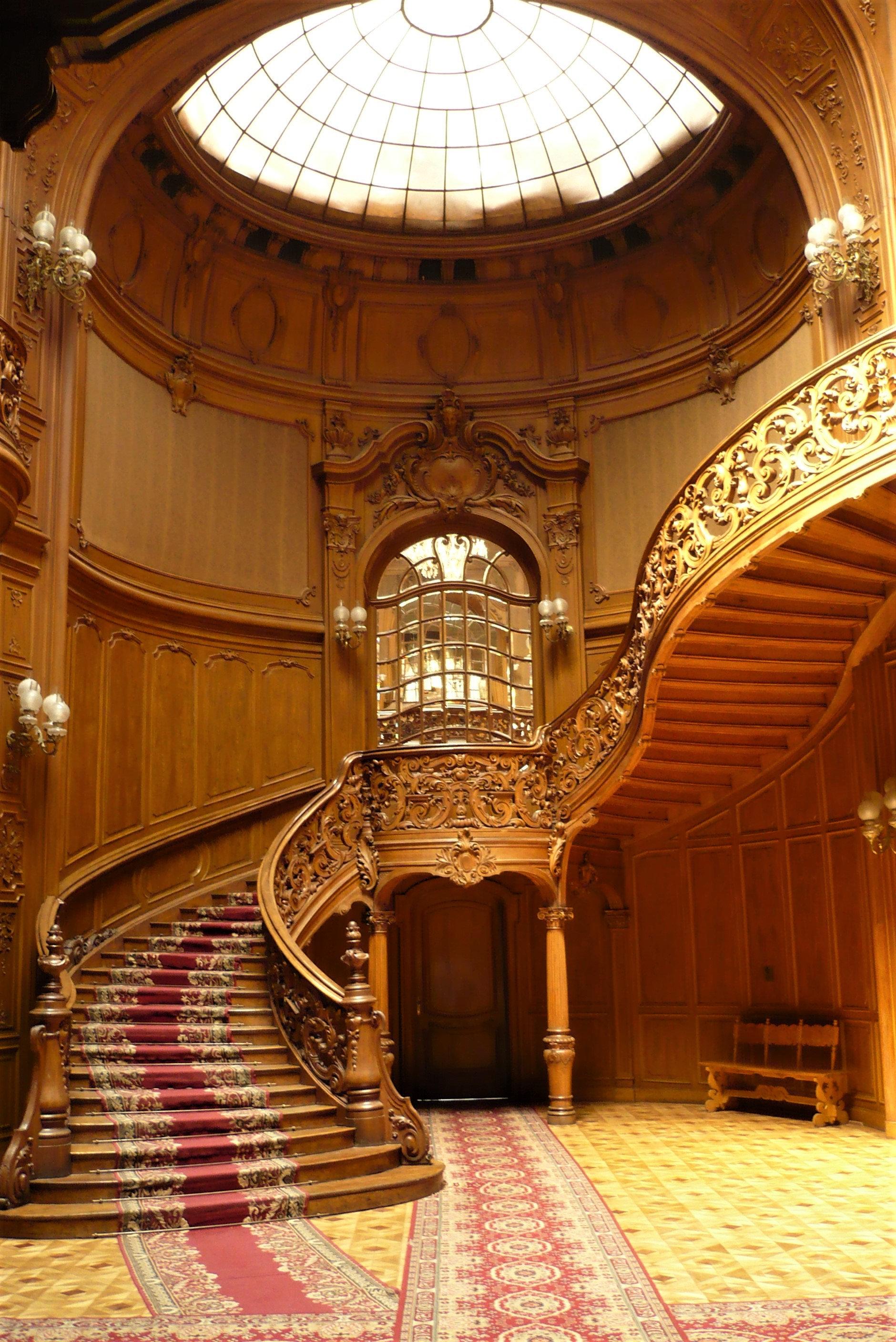 Kasyno Szlacheckie we Lwowie